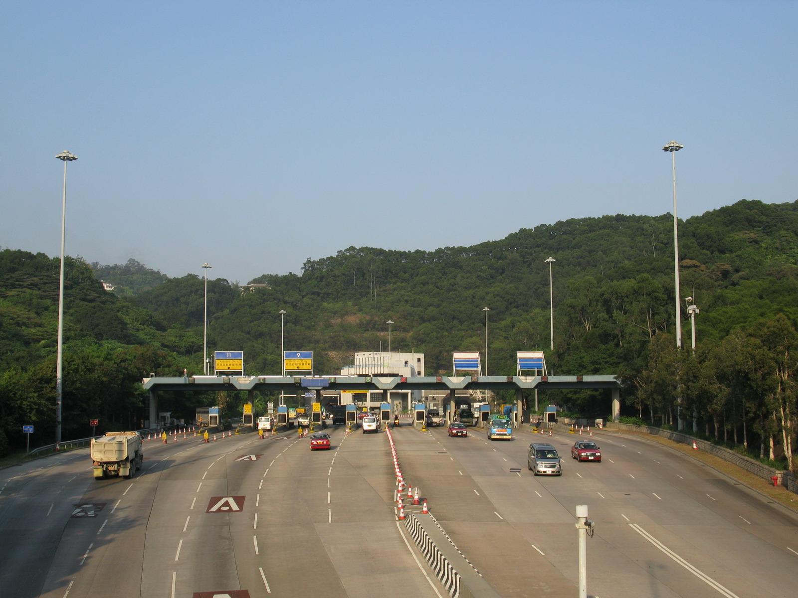 將軍澳隧道-秀茂坪入口 Tseung Kwan O Tunnel Sau Mau Ping Side